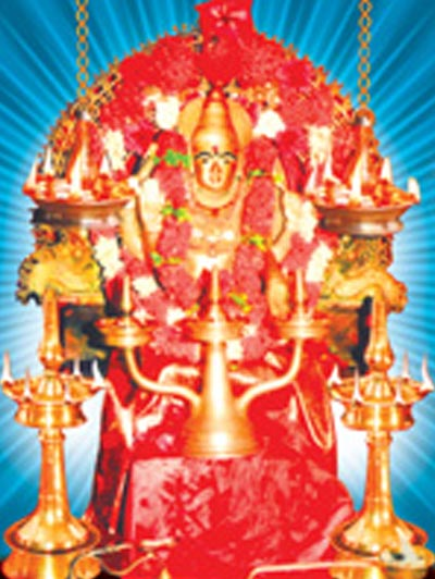 മണക്കാട്ടാമ്മ